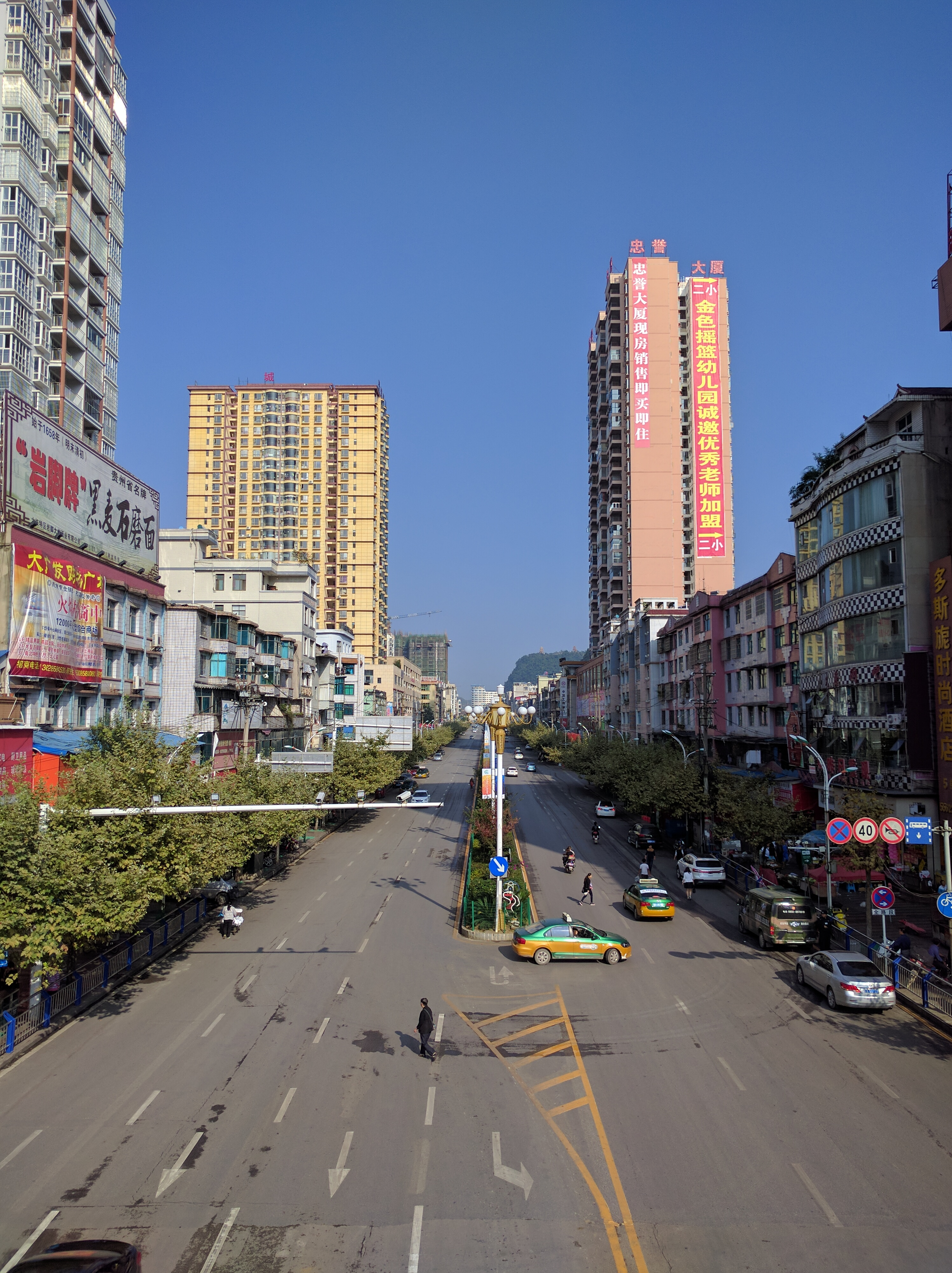 六枝特区那平路